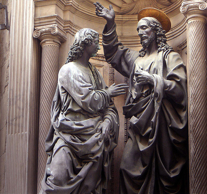 gruppo scultore